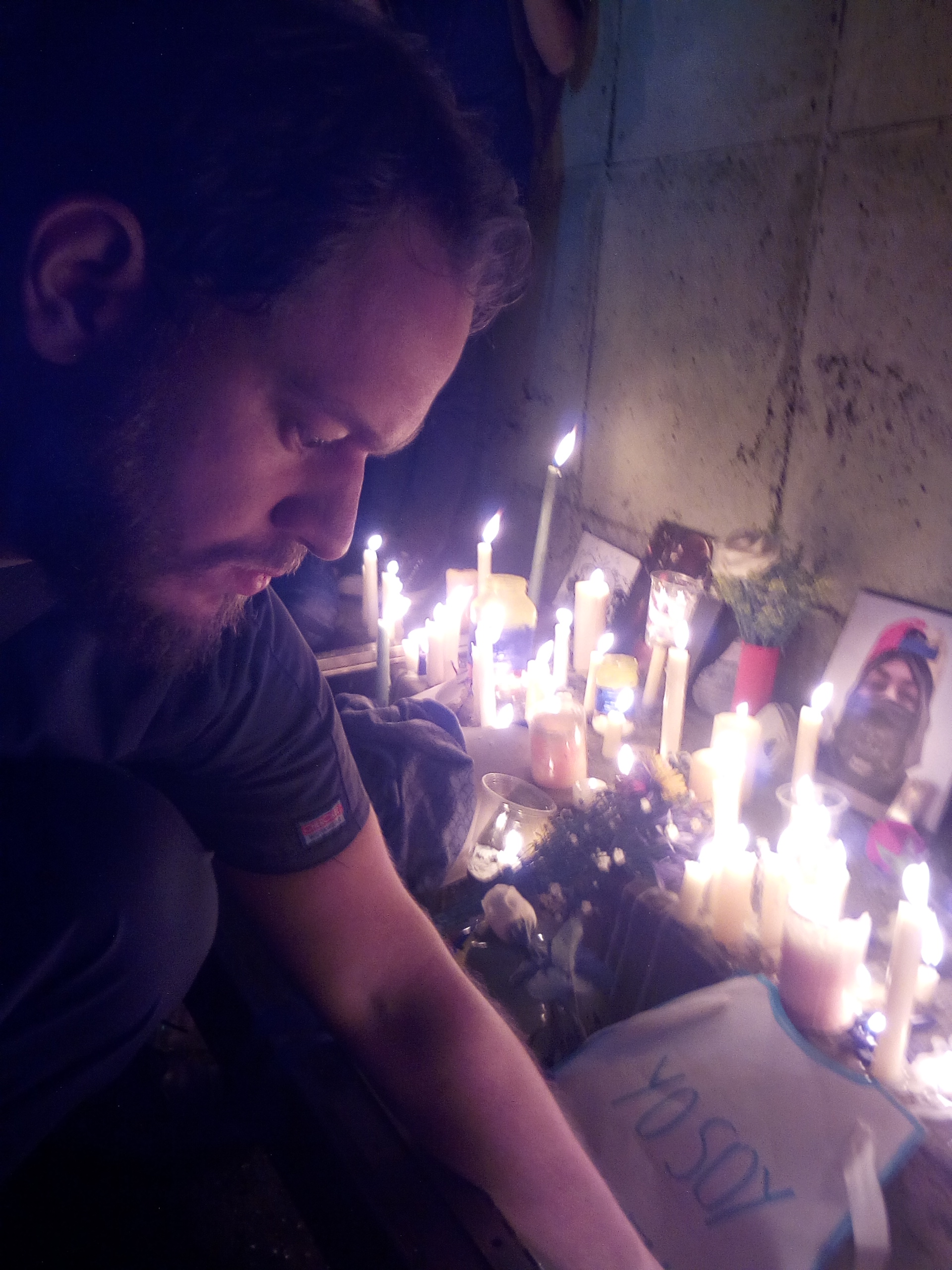 Marcha nocturna en memoria a Neomar Lander el 8 de junio de 2017 en Caracas.